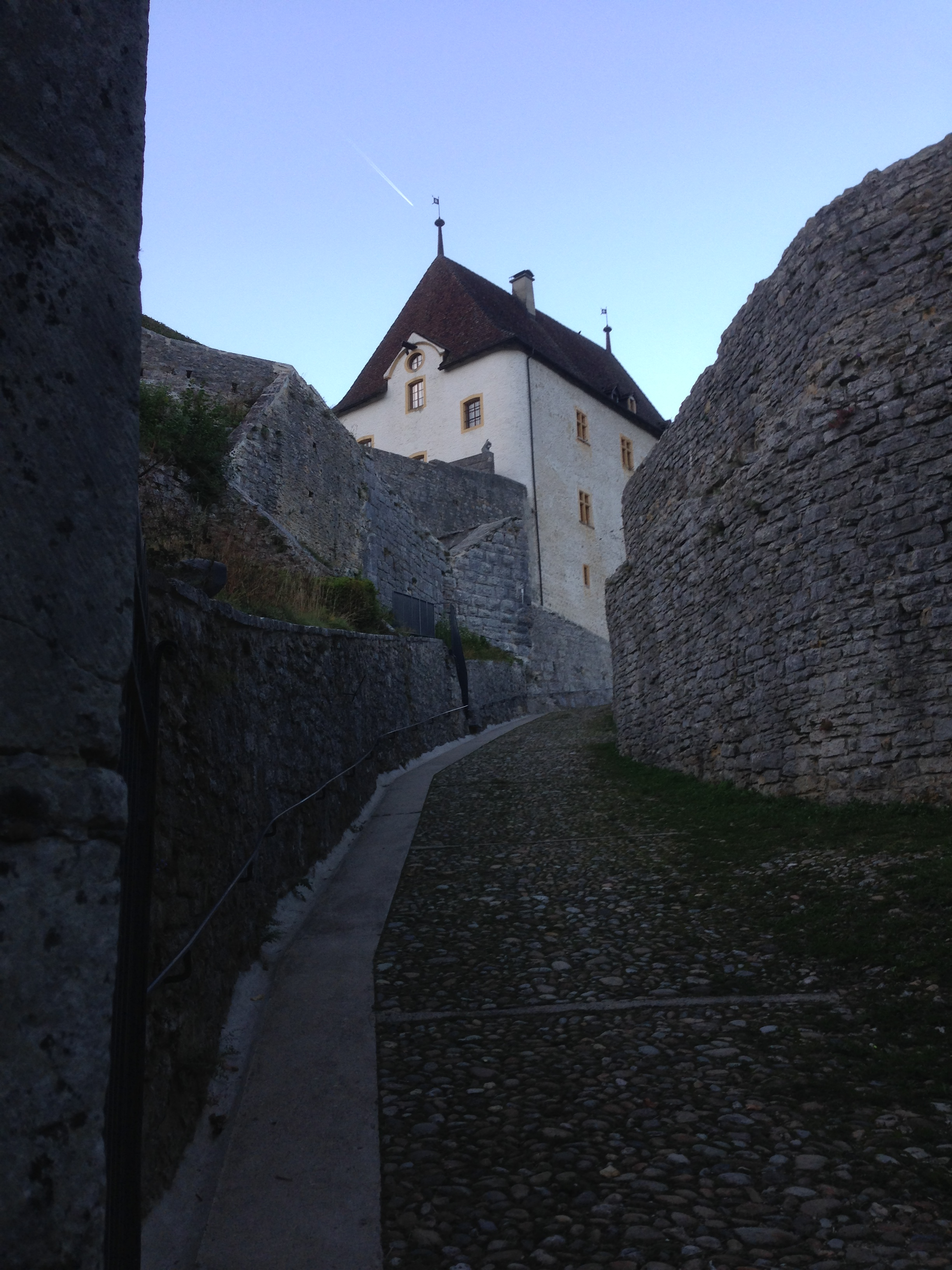 Montée du Château de Valangin dans le petit matin